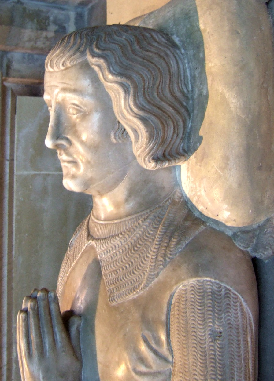 Louis de France (1276-1319)comte d'Evreux (basilique de Saint-Denis; prov. Eglise des Jacobins à Paris)